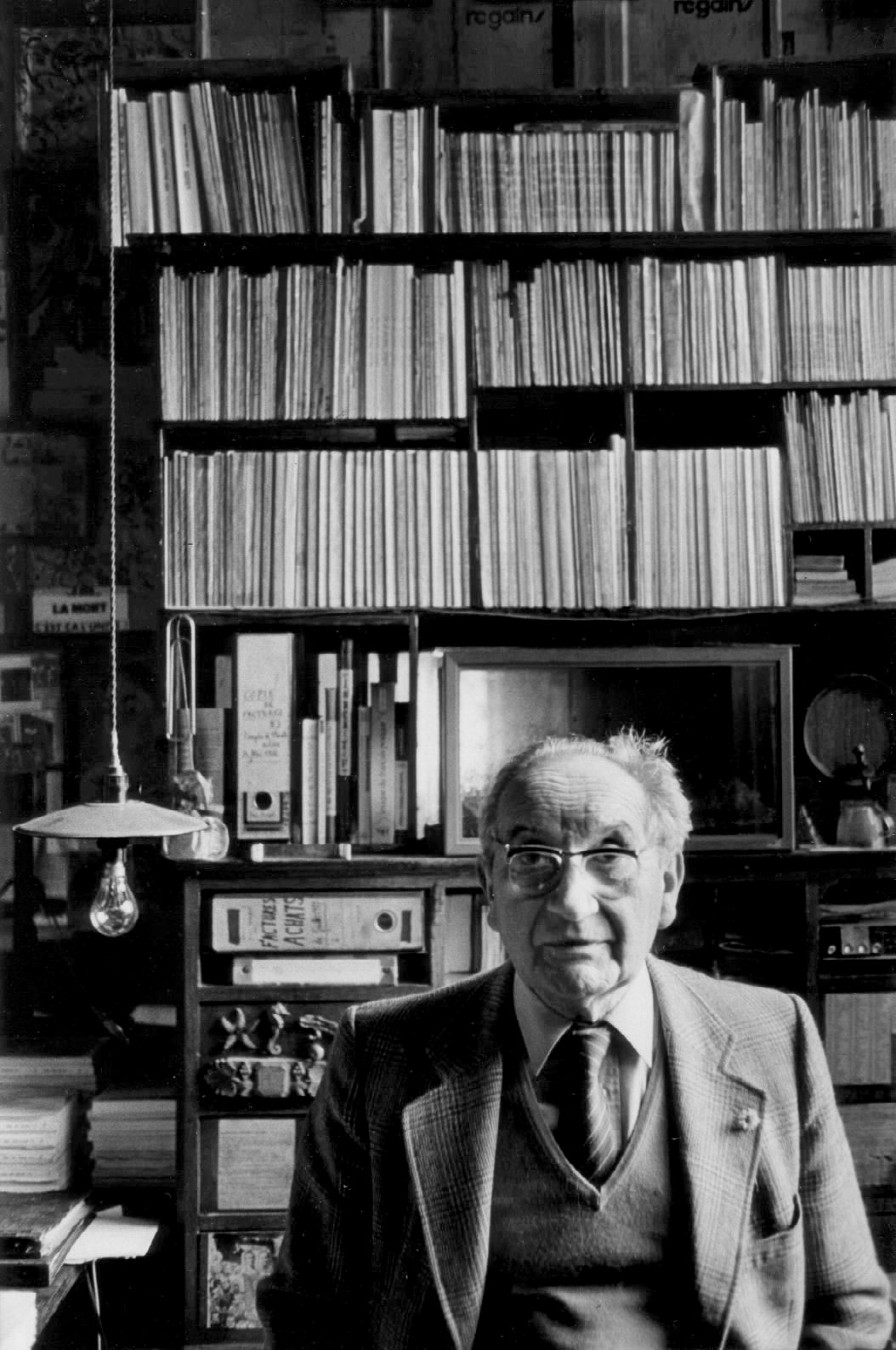 Pierre Boujut dans son bureau en 1983. Jarnac, Charente, France.